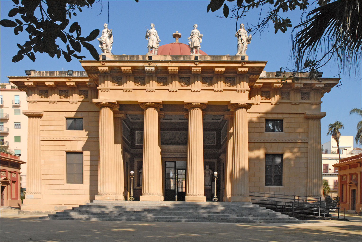 Le Gymnasium : bâtiment historique d'étude et de présentation muséographique La salle centrale comprend une rétrospective historique du jardin. _____________ Le jardin botanique de Palerme a été créé en 1789 et conçu par l'architecte français Dufourny. Il comprend de nombreuses plantes orientales et des arbres poussant dans des régions tropicales acclimatés en Sicile. le site officiel du jardin botanique Le site de l'auteur réalisé en 2001 sur le jardin botanique